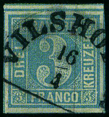 3 Kreuzer Bayern 1849 Ausgabe, Halbkreis Antiqua VILSHOFEN (Nd).